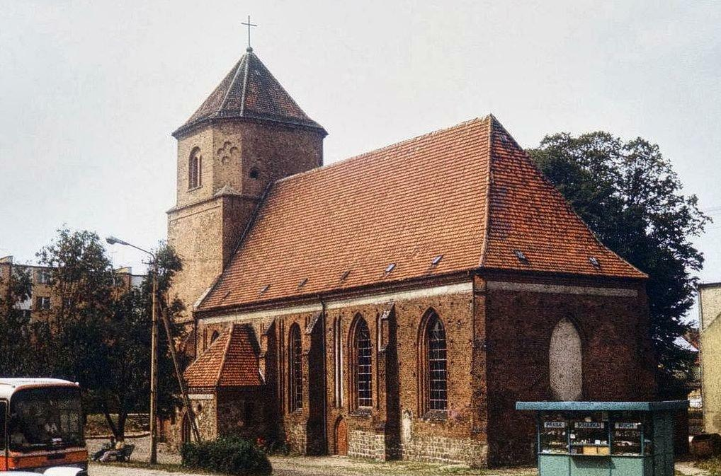 Kościół św. Mikołaja w Sulęcinie.